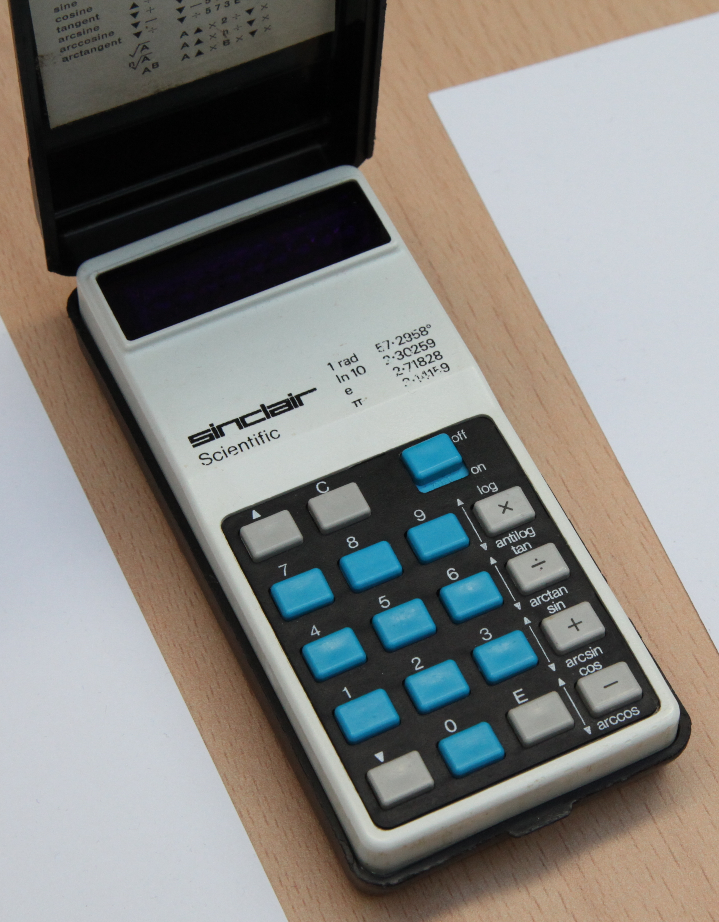 Sinclair Scientific Taschenrechner 1974-? CPU: TMC0805NC Display: LED 5+2 Zeichen Größe: 111 x 50 x 18 mm Gewicht: 55 g 4 x AAA Batterie